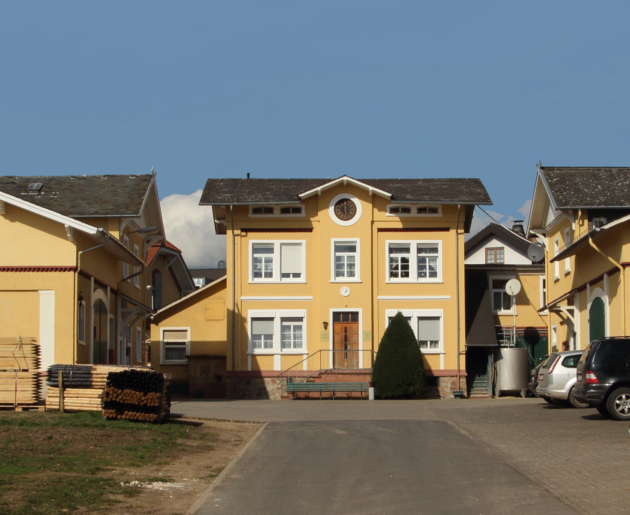 Weingut G.H. von Mumm, Johannisberg im Rheingau, Hessen.